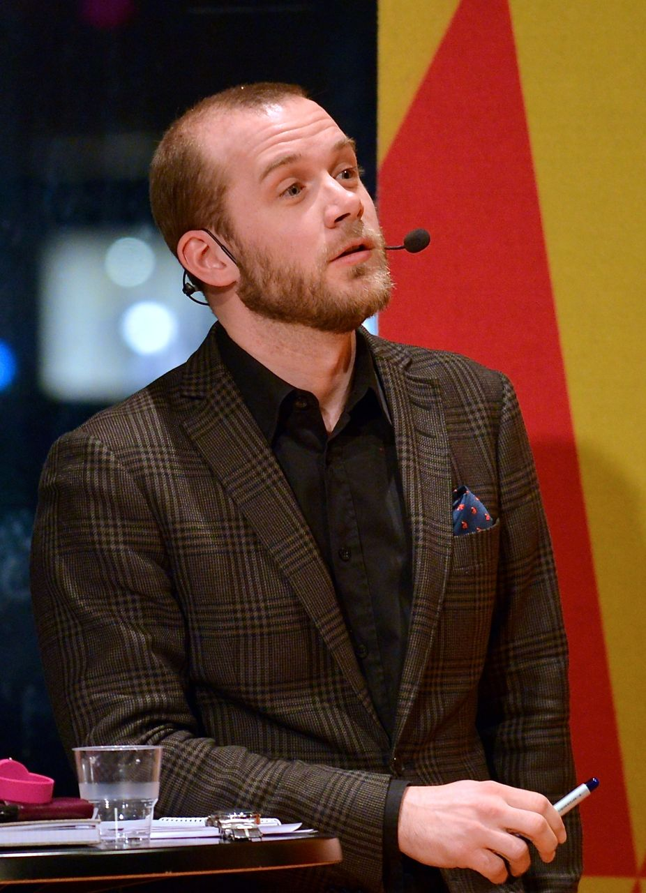 Lars Anders Johansson i en kulturpolitisk idédebatt på Forum/Debatt i Studion på Kulturhuset-Stadsteatern i Stockholm den 24 februari 2014.